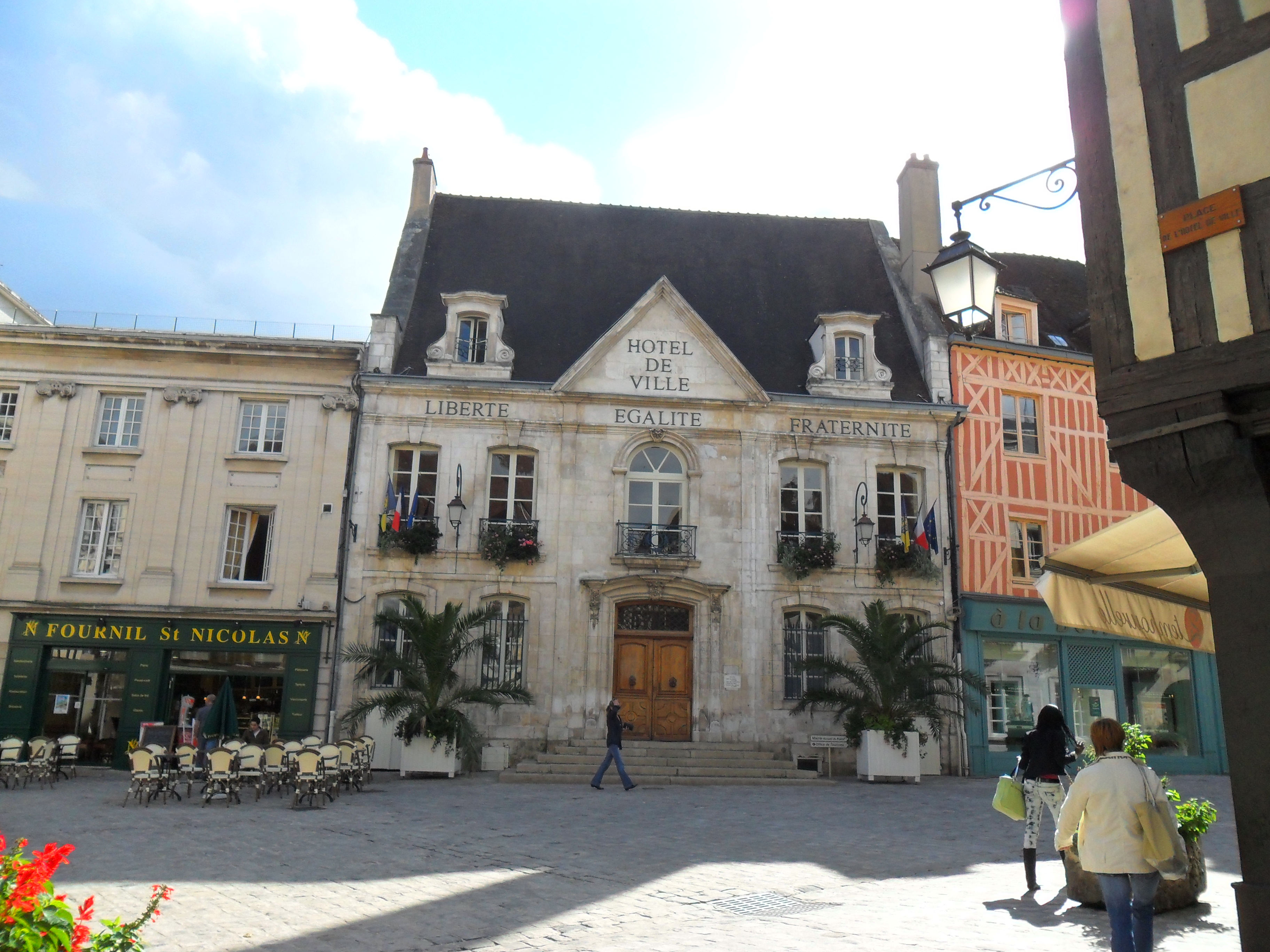 Marie d'Auxerre